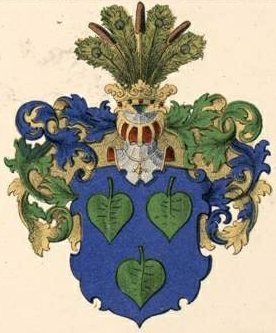 Koskulli suguvõsa aadli- ja parunivapp